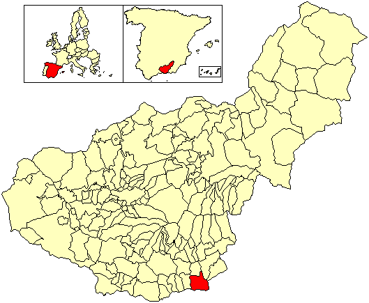 Situación del término municipal de Albuñol respecto a la provincia de Granada, en España.